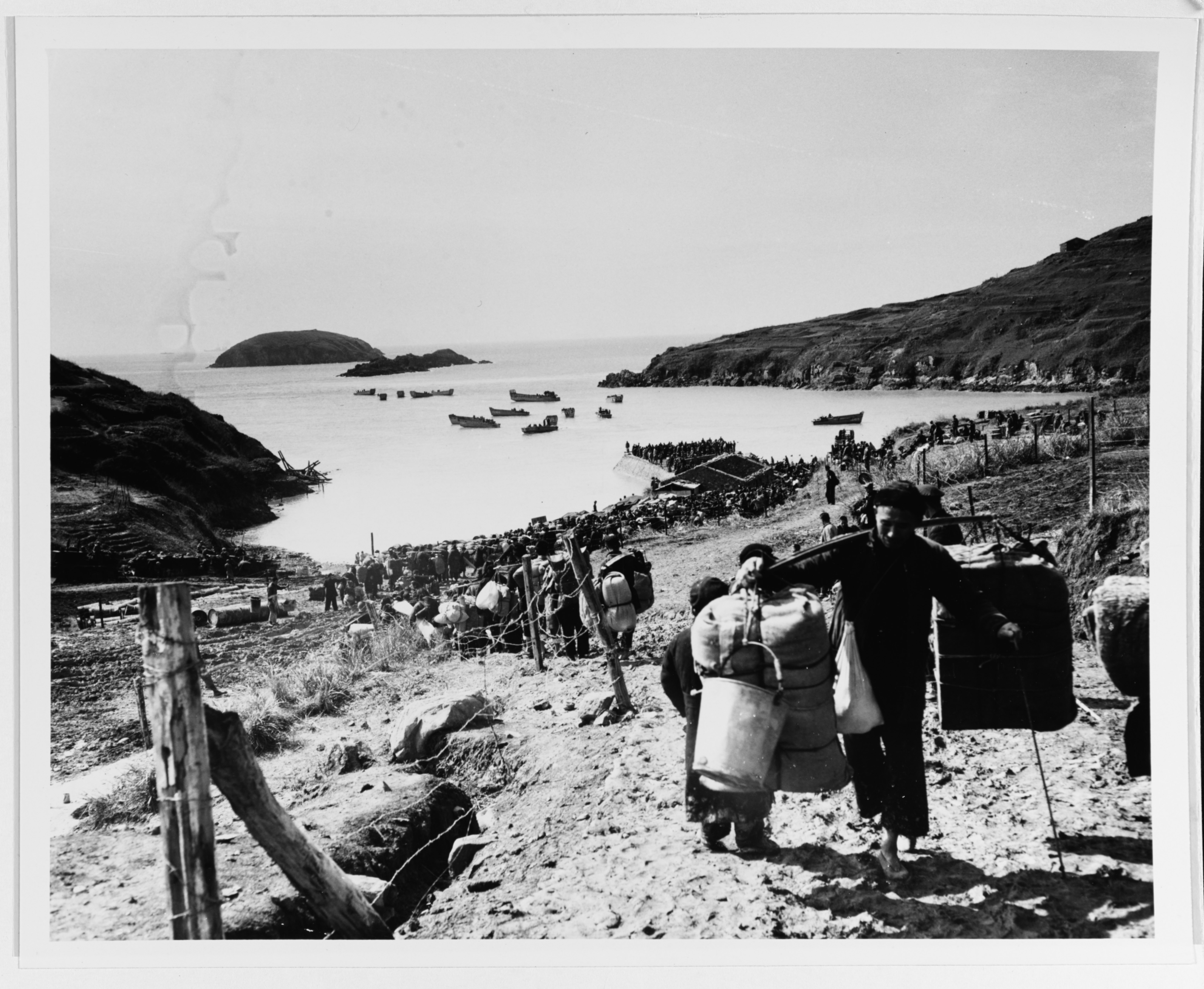 1955年（民國四十四年）2月大陳島撤退時，中國軍民在海灘上排隊等候登上第七艦隊的船